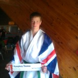 Concurrent: Thomas Humphrey Âge: moins de 17 ans Poids: Under66kg